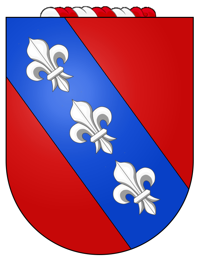 De vermelho, uma banda de azul perfilada de ouro e carregada de três flores-de-lis de prata. Timbre: um braço vestido de vermelho, segurando na mão uma das flores-de-lis do escudo.